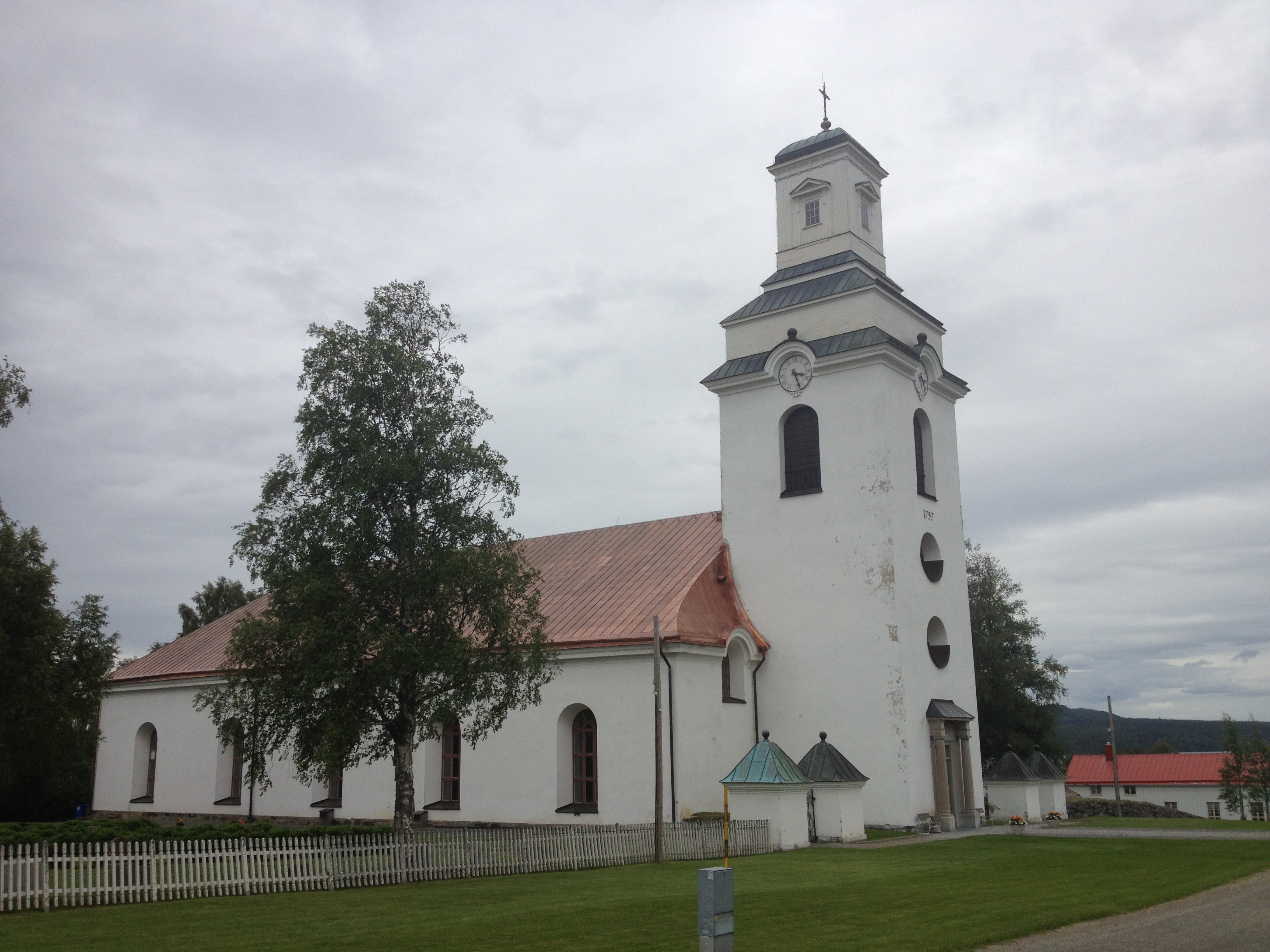 Bergs kyrka i Jämtland, Härnösands stift.